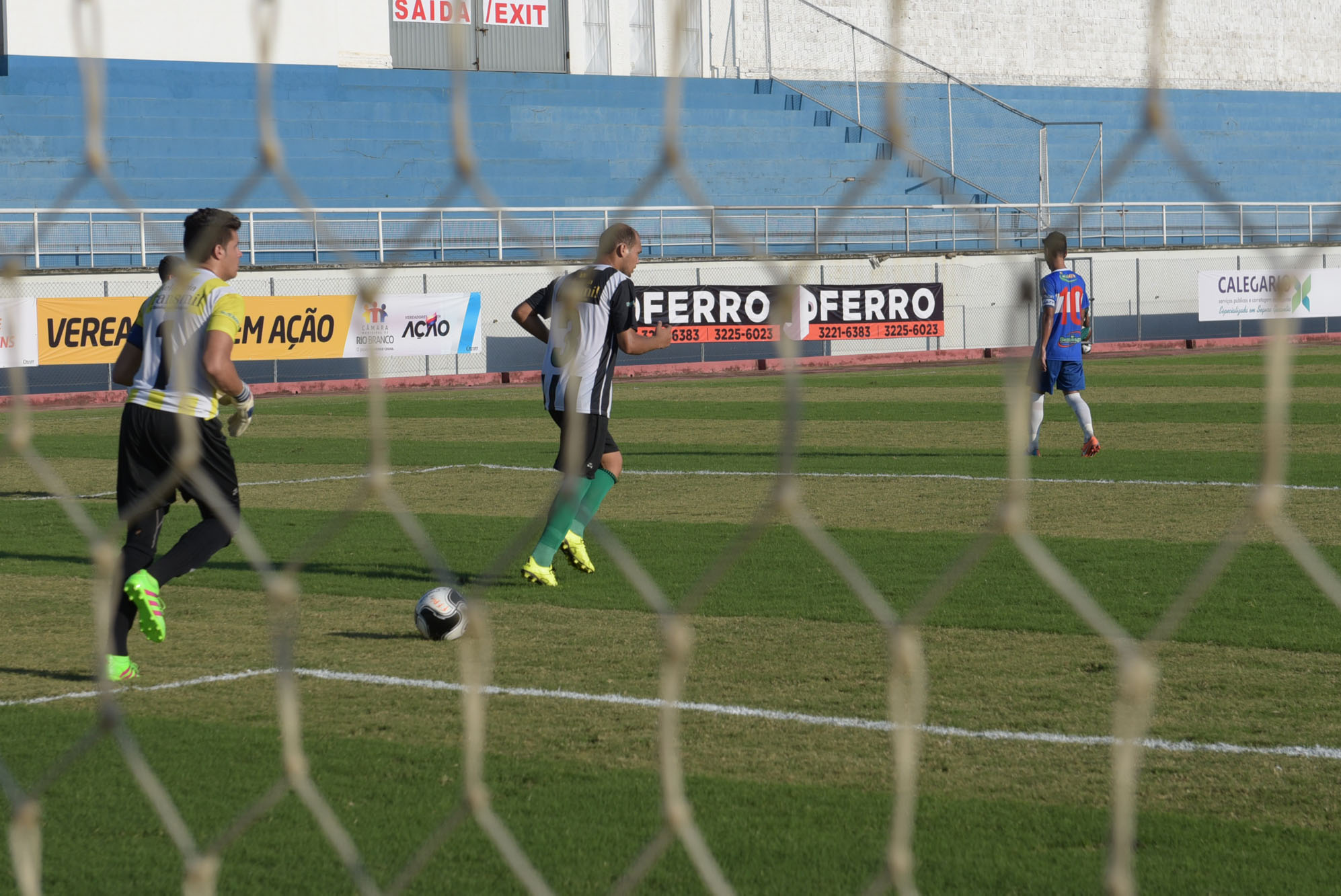 Fotos: Diego Gurgel/Secom